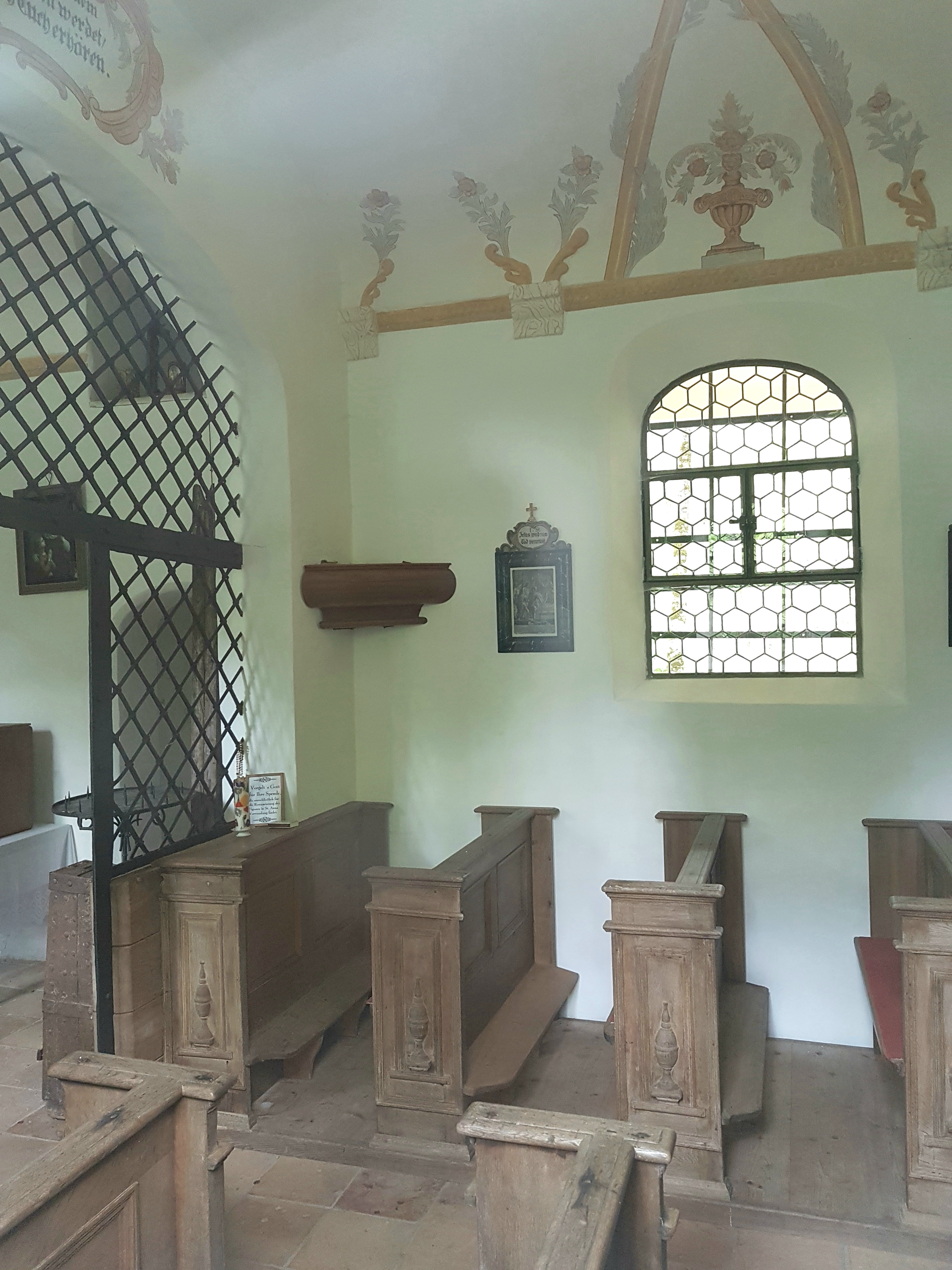 Straucharting (Sauerlach), St. Anna-Kapelle, vorderer Teil des kurzen Langhauses mit Decken- und Wandmalereien.